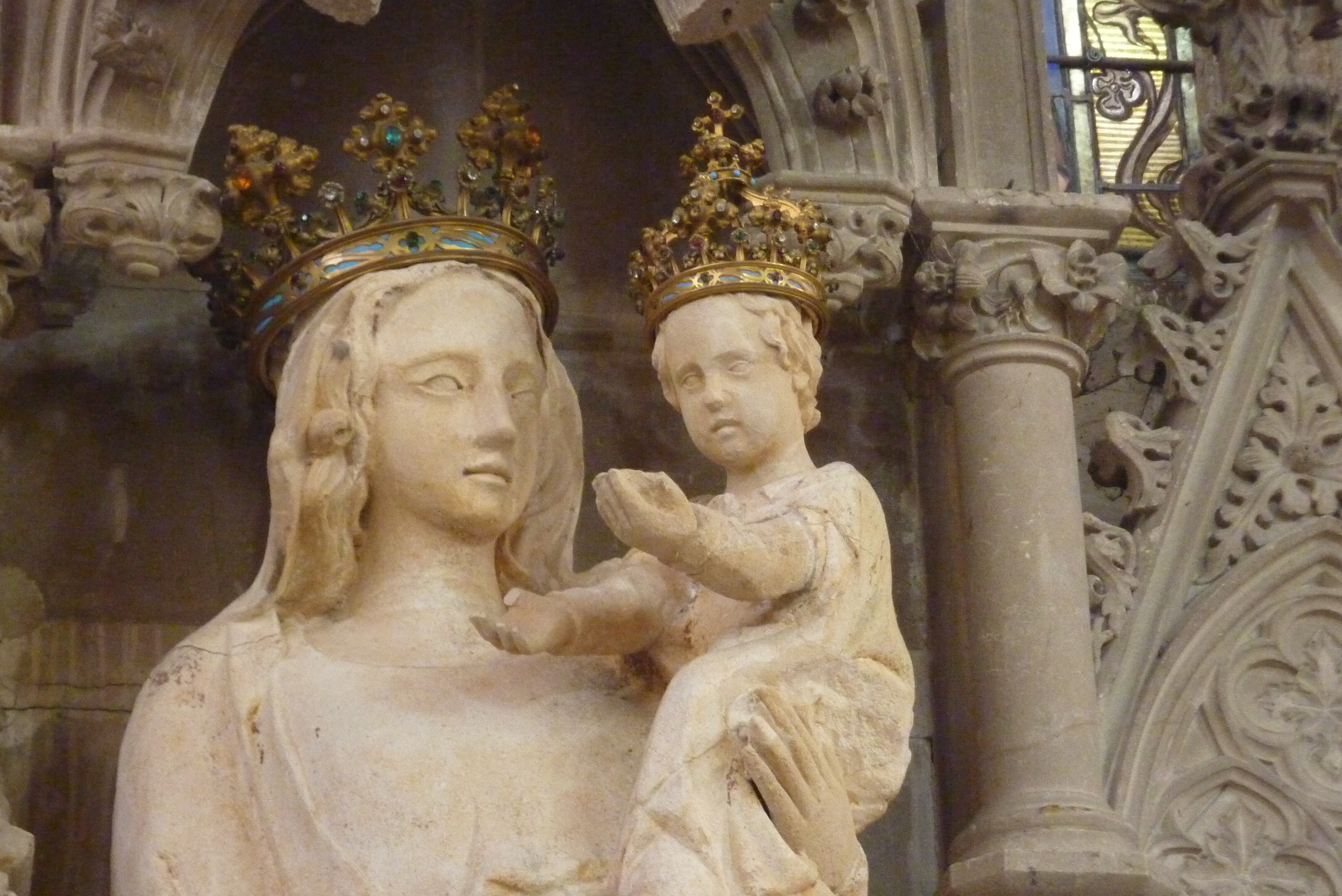 Notre-Dame du Guet (XIVe siècle) située dans l'église Saint-Étienne de Bar-le-Duc.